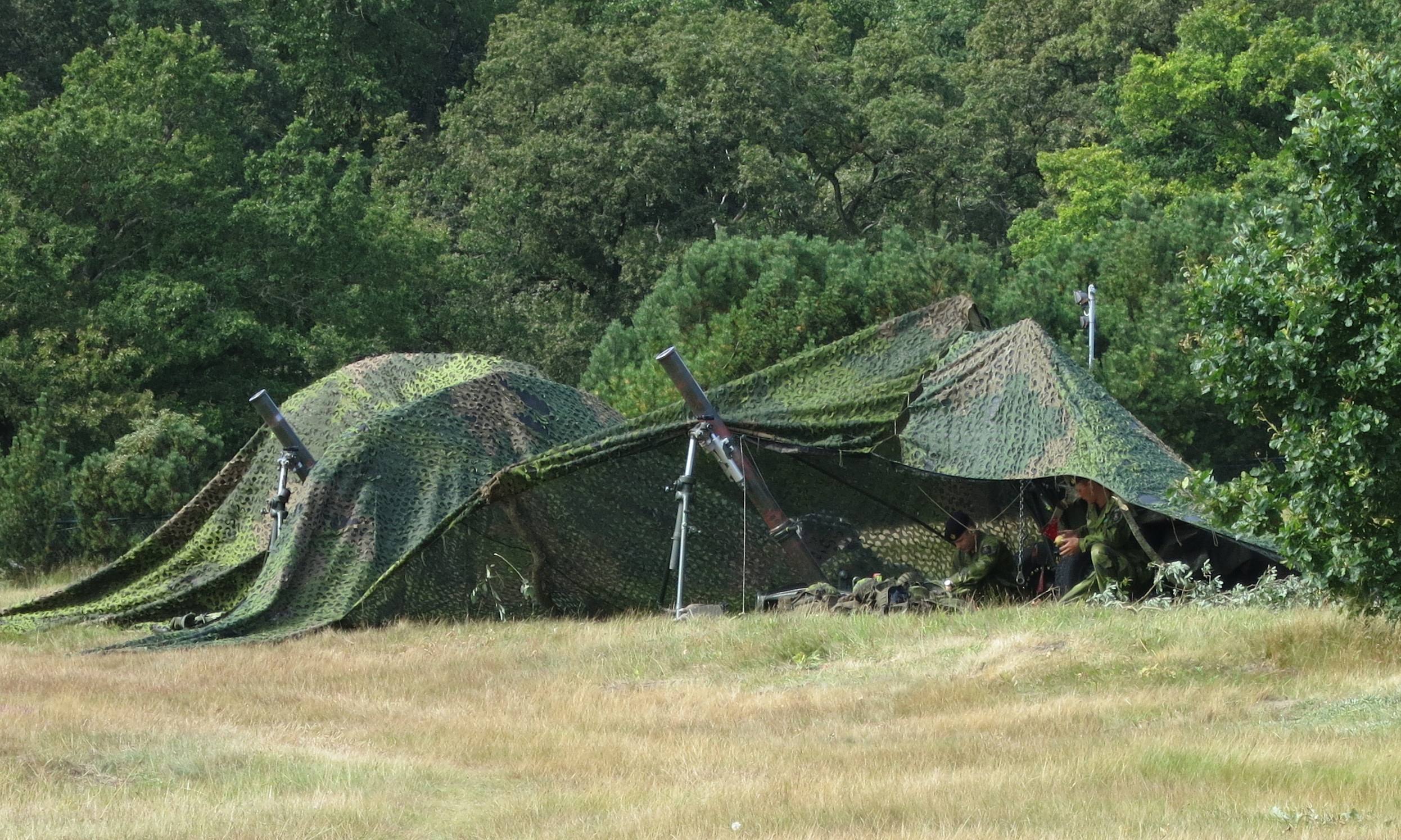 Granatkastarbatteriplats vid Regementets Dag på P7 Revingehed